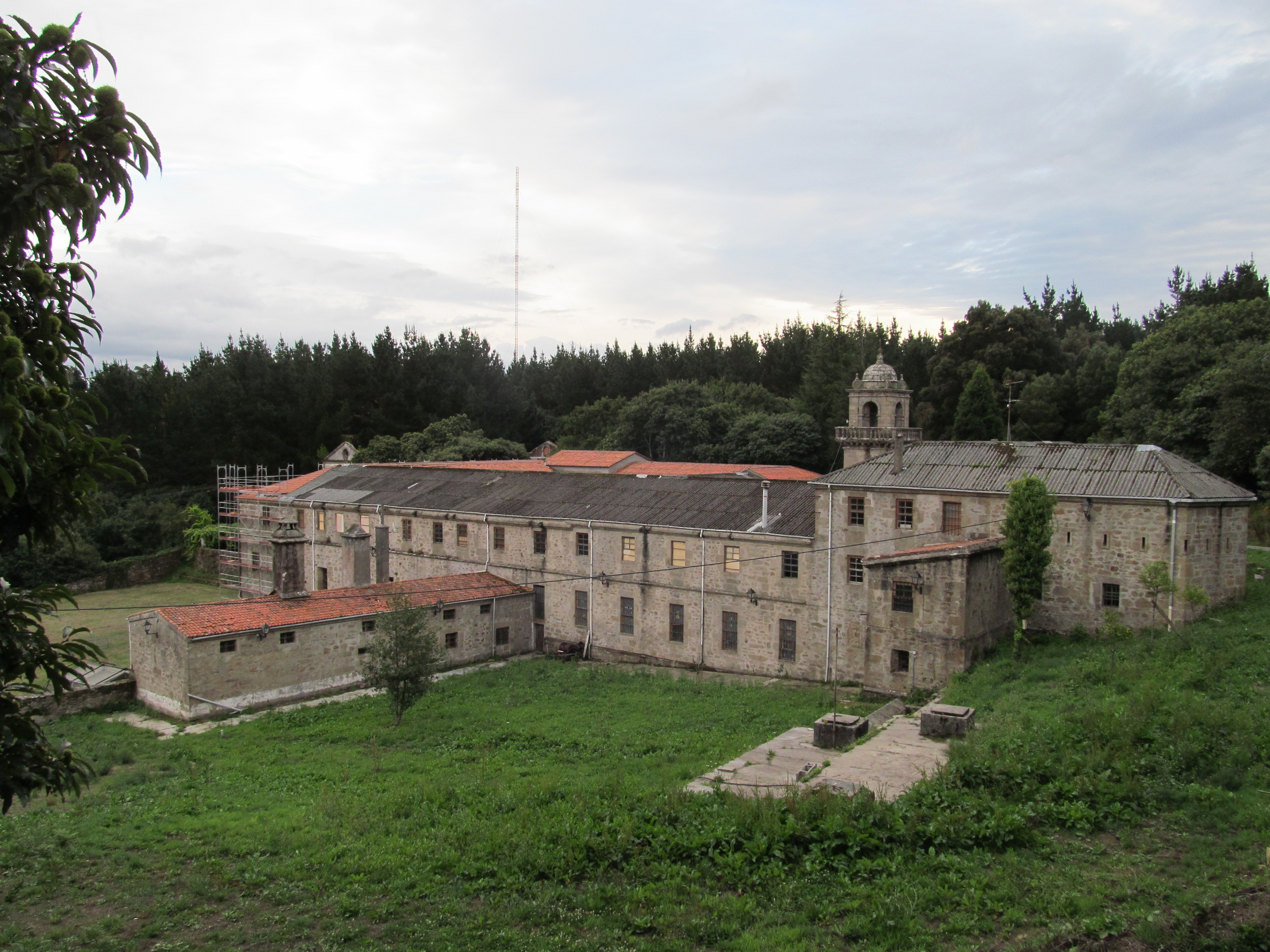 Monasterio de Santa Catalina de Montefaro (Ares) A Coruña, Galicia, España, en fase de restauración. El monasterio tiene un origen románico, a lo largo de la historia sufrió grandes modificaciones, la más grande fue en el siglo XVIII, dándole a la iglesia un aspecto barroco.